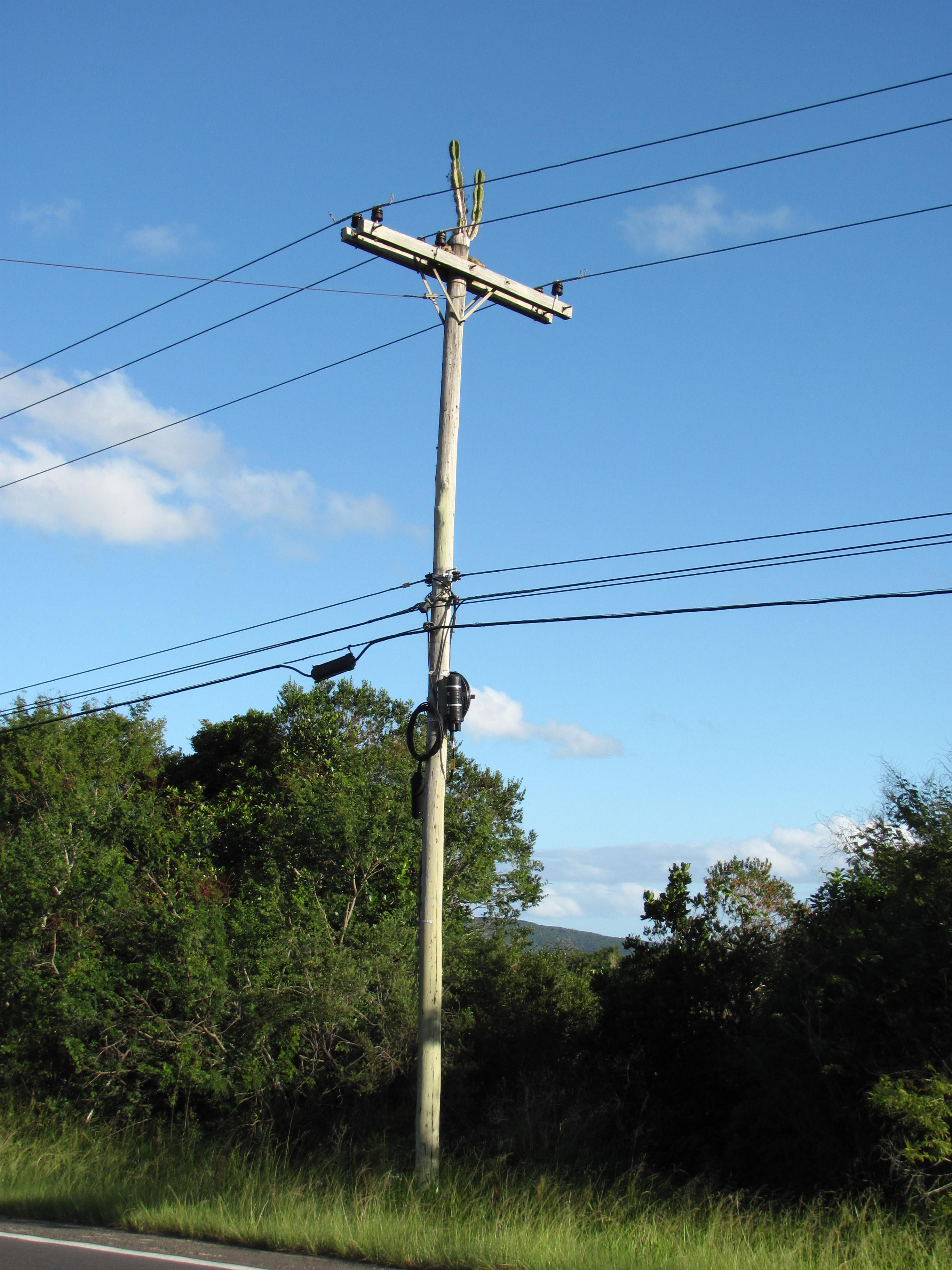 Cactus em Porto Alegre, em cima de um poste de transmissão de energia.